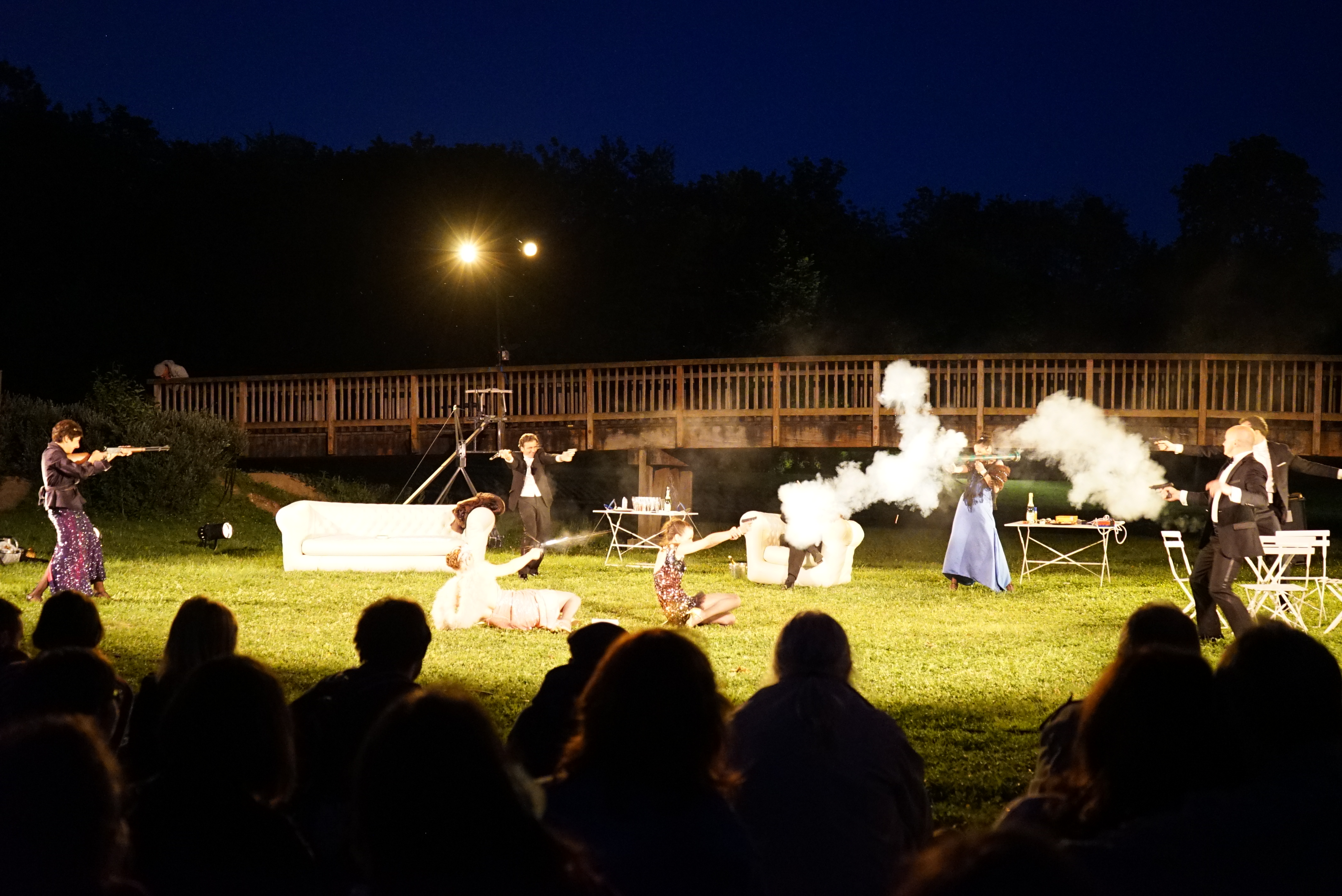 lors du festival Furies 2015 ;.